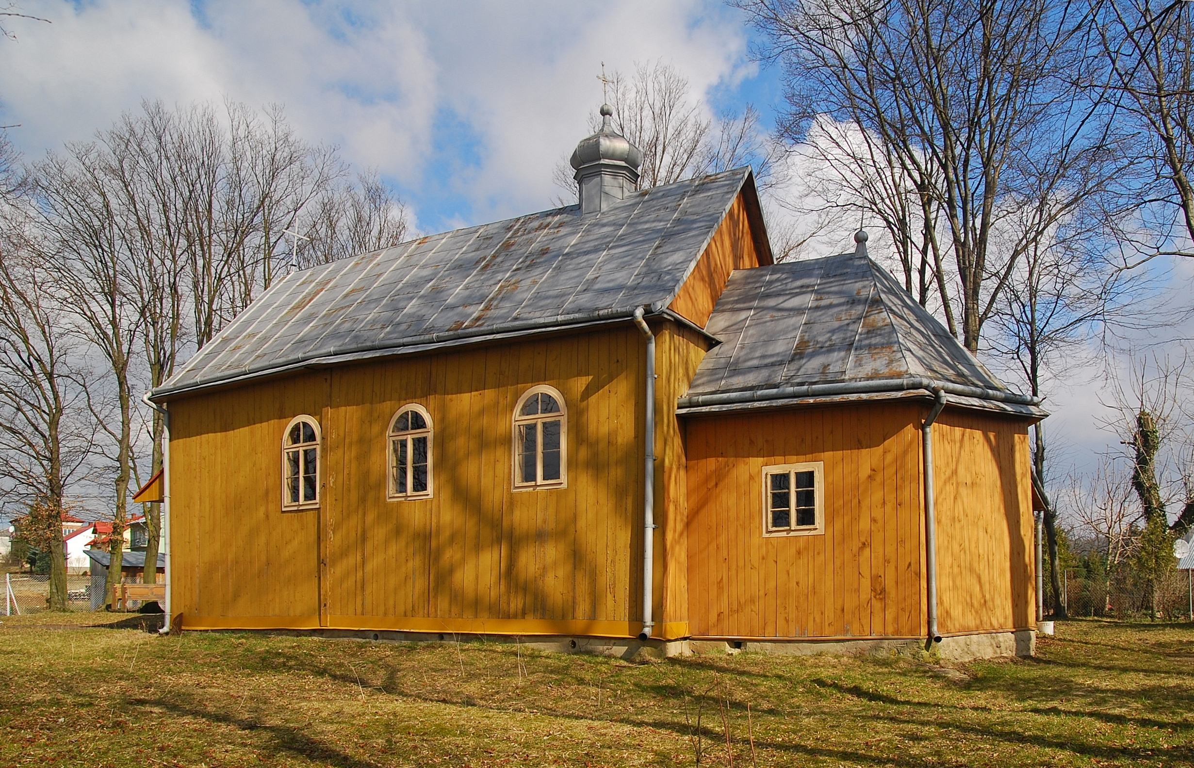 wieś Reczpol